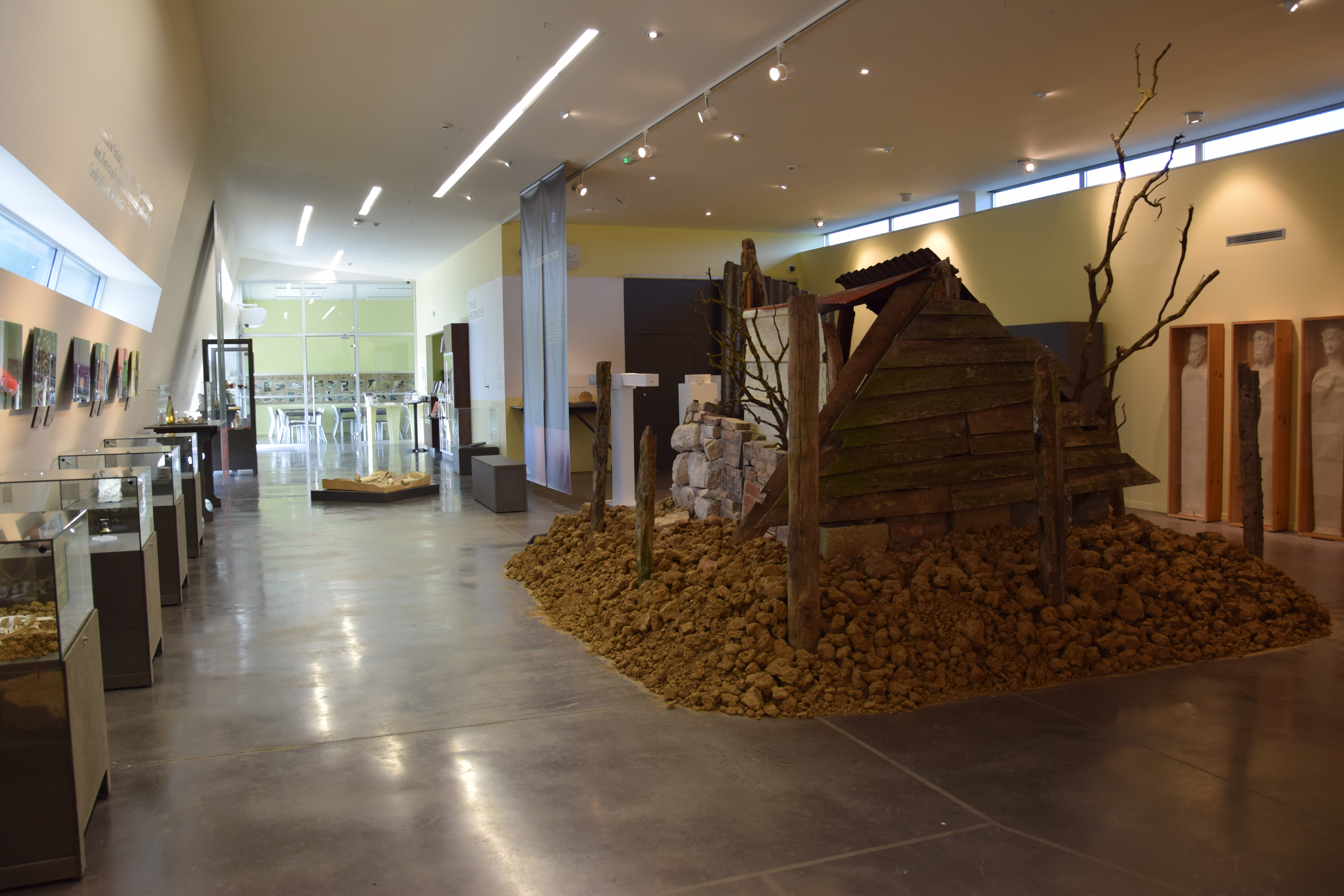 Musée archéologique de l'Oise (Vendeuil-Caply)